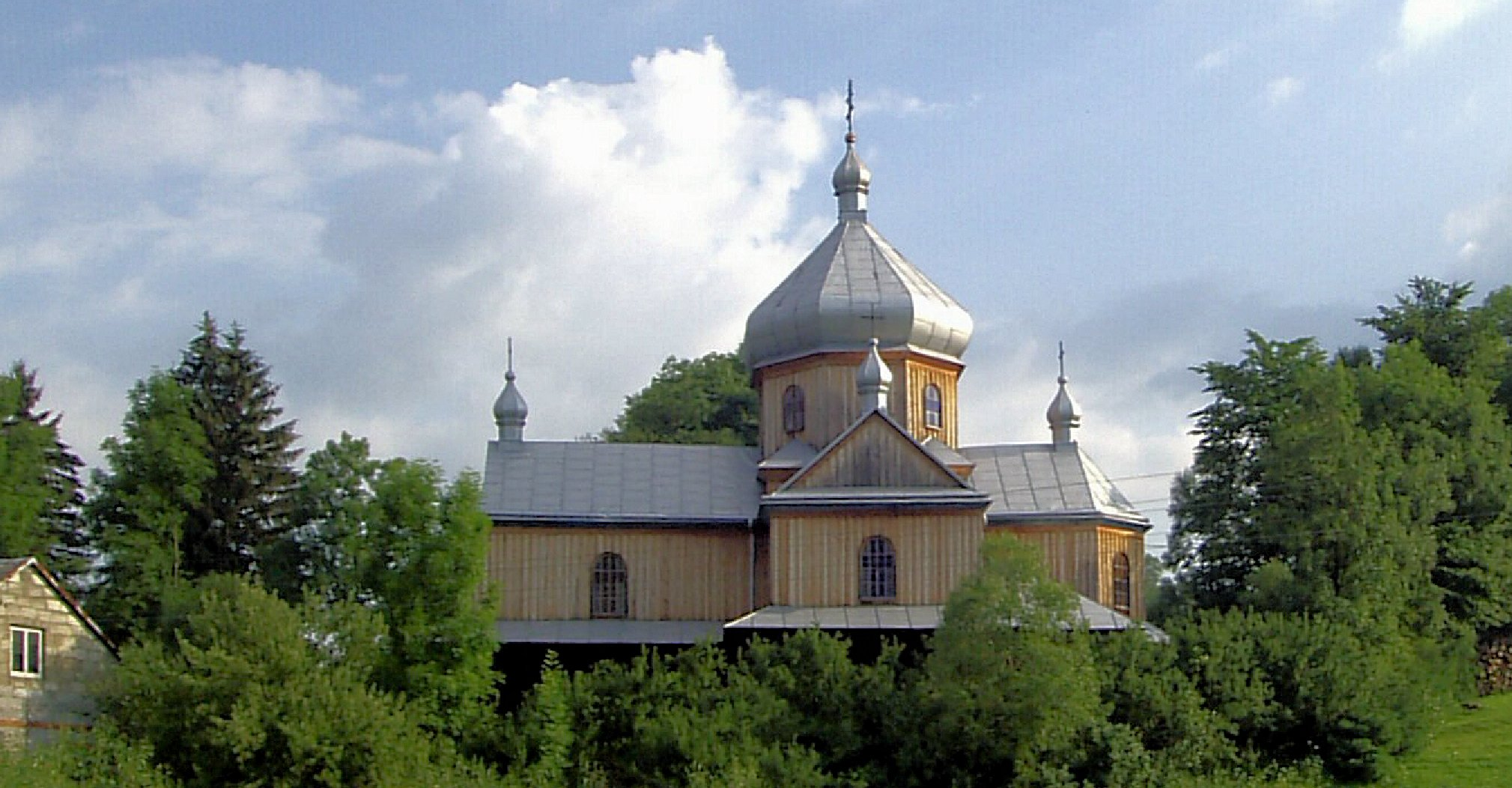 Cerkiew św. Paraskewy w Daliowej